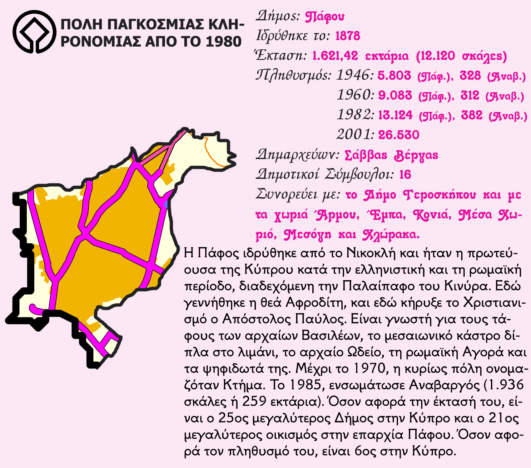 Συνοπτική παρουσίαση της Πάφου